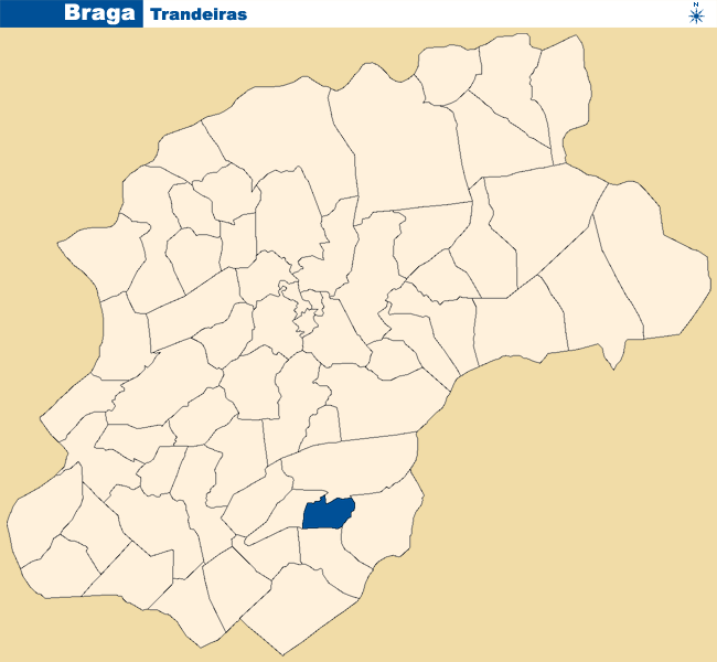 Localização de Trandeiras no concelho de Braga.